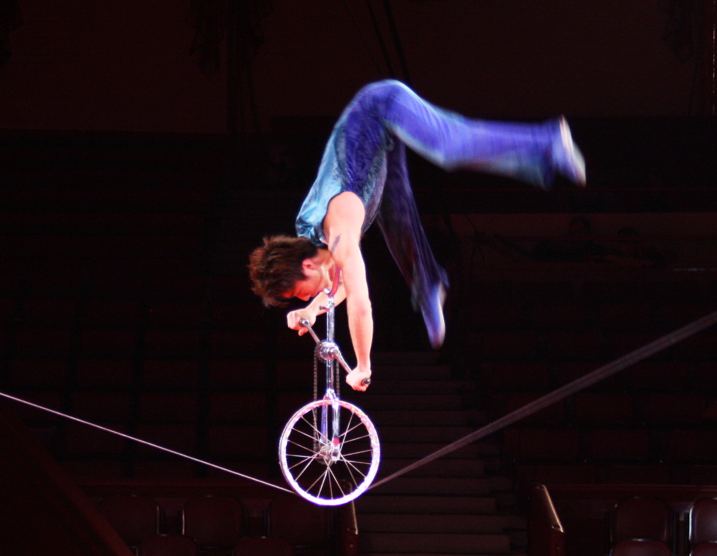 ZHANG FAN - Chinesischer Artist auf dem Schlappseil in einer Zirkusvorstellung